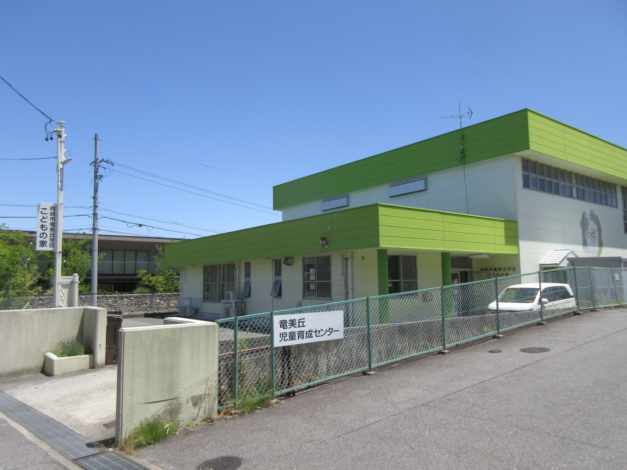 岡崎市竜美丘学区こどもの家（岡崎市竜美東）